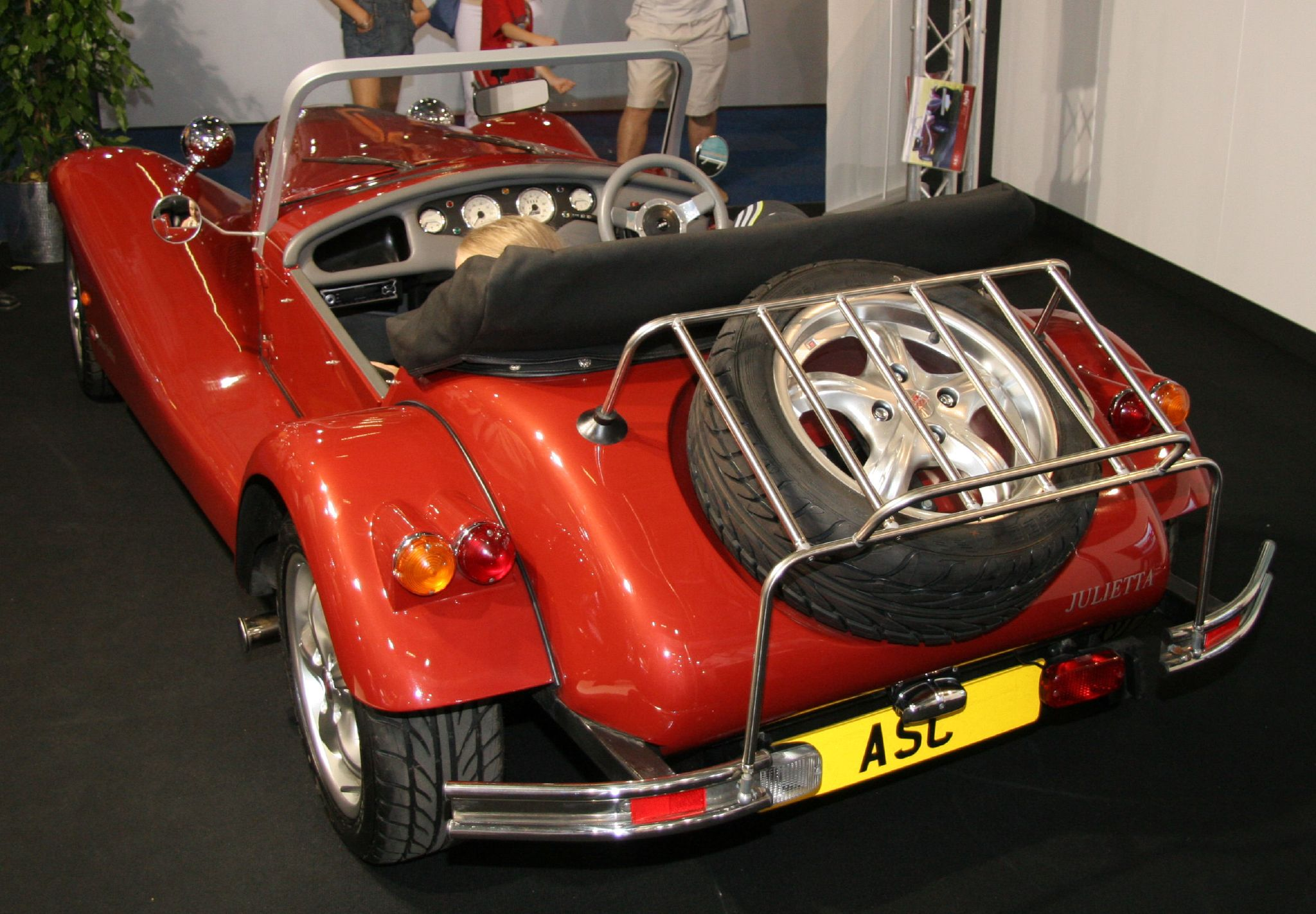 Aquila JuliettaAquila Julietta